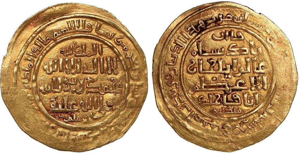 سکه دینار اباقا خان به وزن ۷/۶۶ گرم. ضرب اصفهان